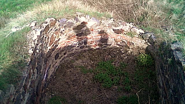 Blick in einen der hufeisenförmigen Türme des spätantiken Kastells.